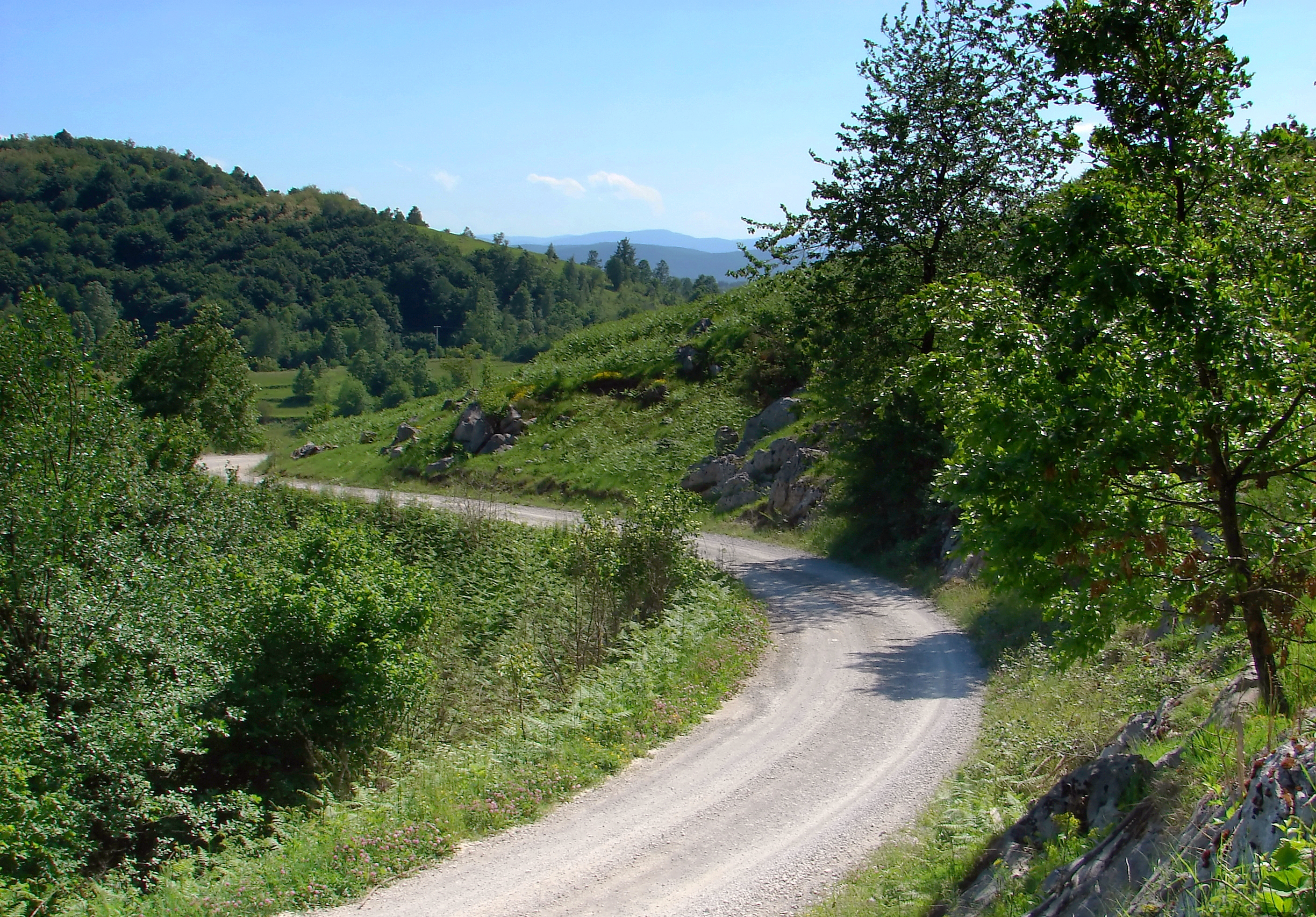 Cesta makadam - primjer ceste od makadama